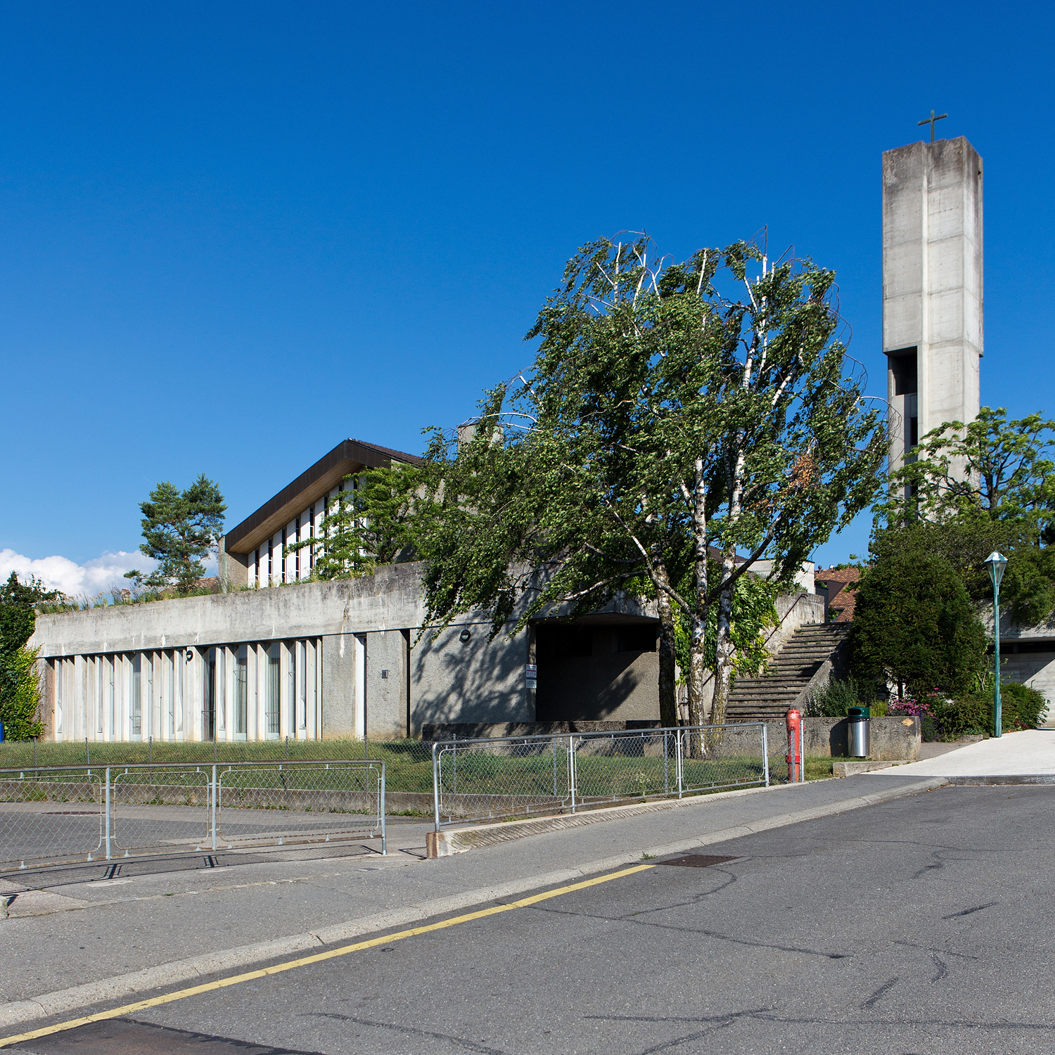 Reformierte Kirche (Temple) von Gland